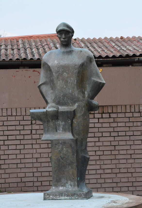 Spomenik Đure Đakovića ispred njegove rodne kuće u Slavonskom Brodu